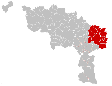 Situation du Pays de Charleroi au sein du Hainaut. Je suis l'auteur de cette image. R@vən (d) 7 mars 2008 à 19:01 (CET)